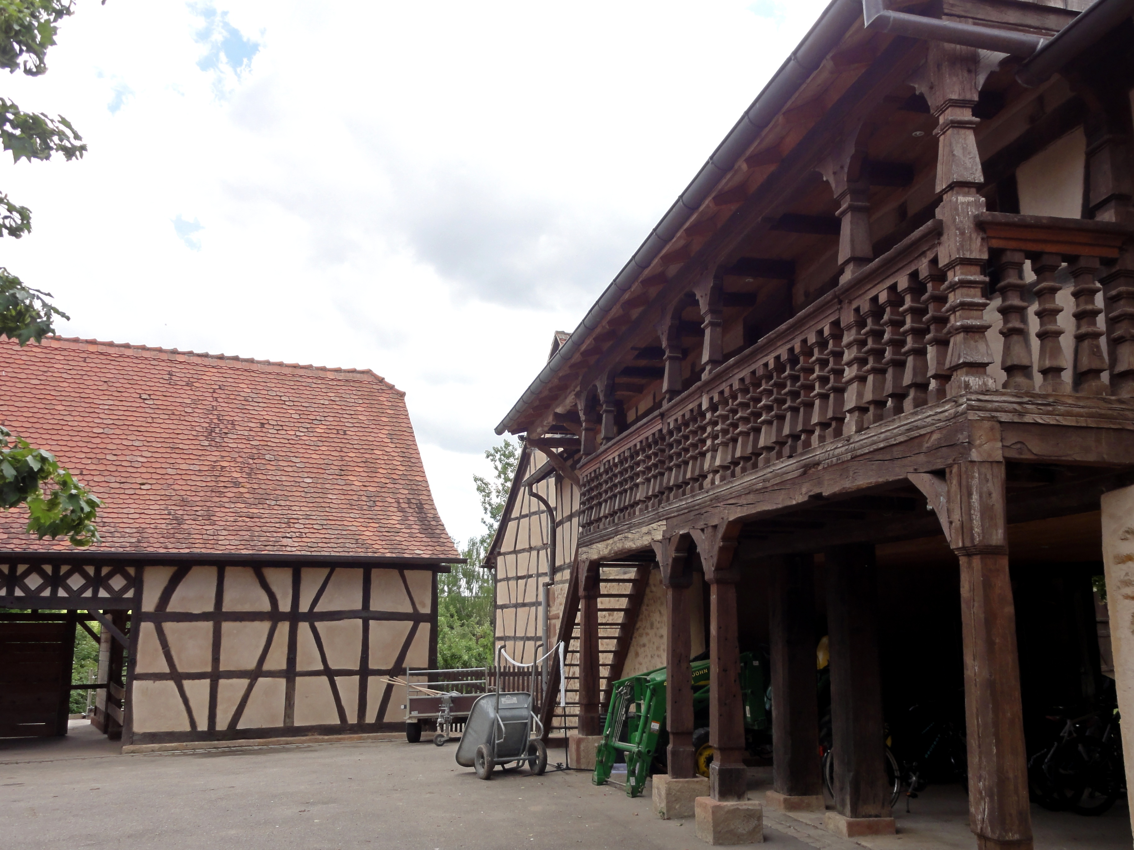 Alsace, Bas-Rhin, Schalkendorf, Ferme (XVIIIe), 13 rue Principale. Galerie sur dépendances. .